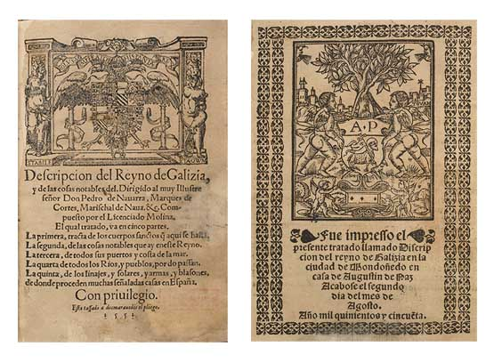 Descripcion del Reyno de Galizia y de las cosas notables del